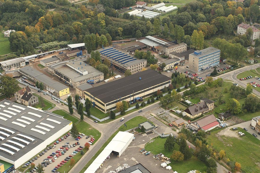 Fabryka Pił i Narzędzi Wapienica w Bielsku-Białej (ul. Regera).